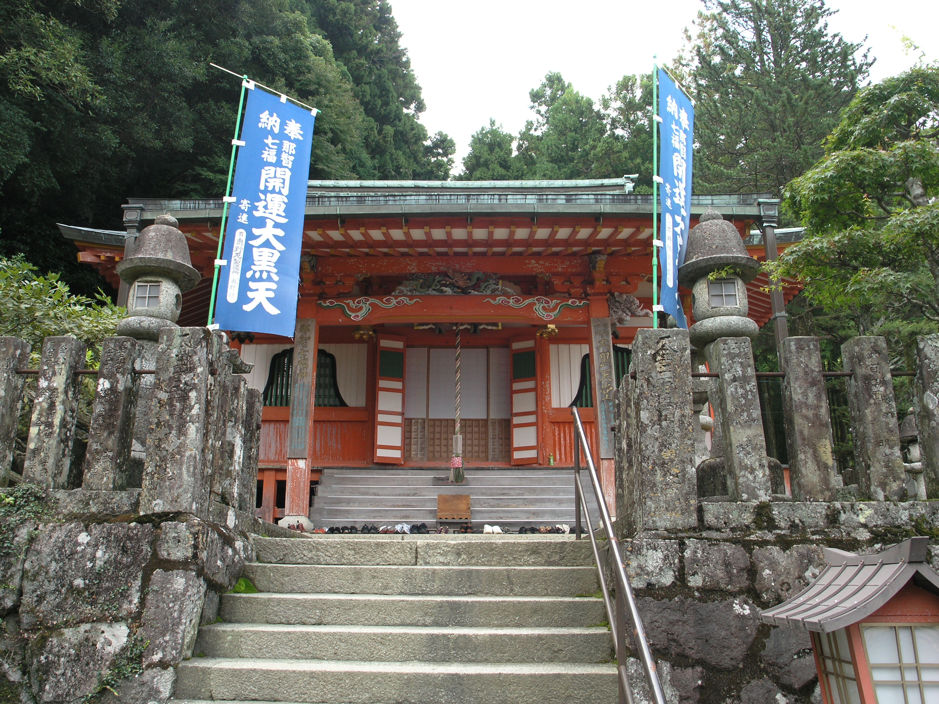 那智山青岸渡寺 (和歌山県東牟婁郡那智勝浦町) 2008年10月撮影。 機材：C8080WZ 撮影者：Kansai explorer